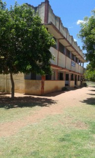 G H S NALLUR